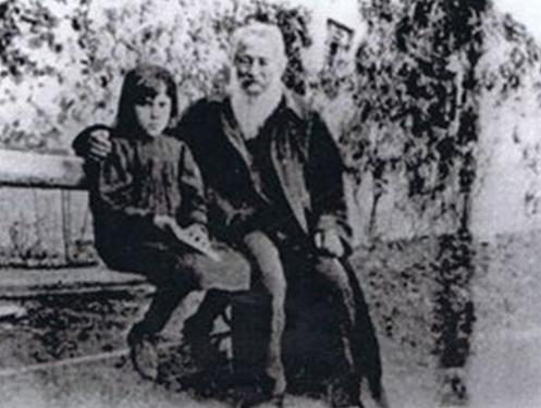 Marquês de Soydos e Dª. Maria da Madre de Deus d' Orey Pereira Coutinho